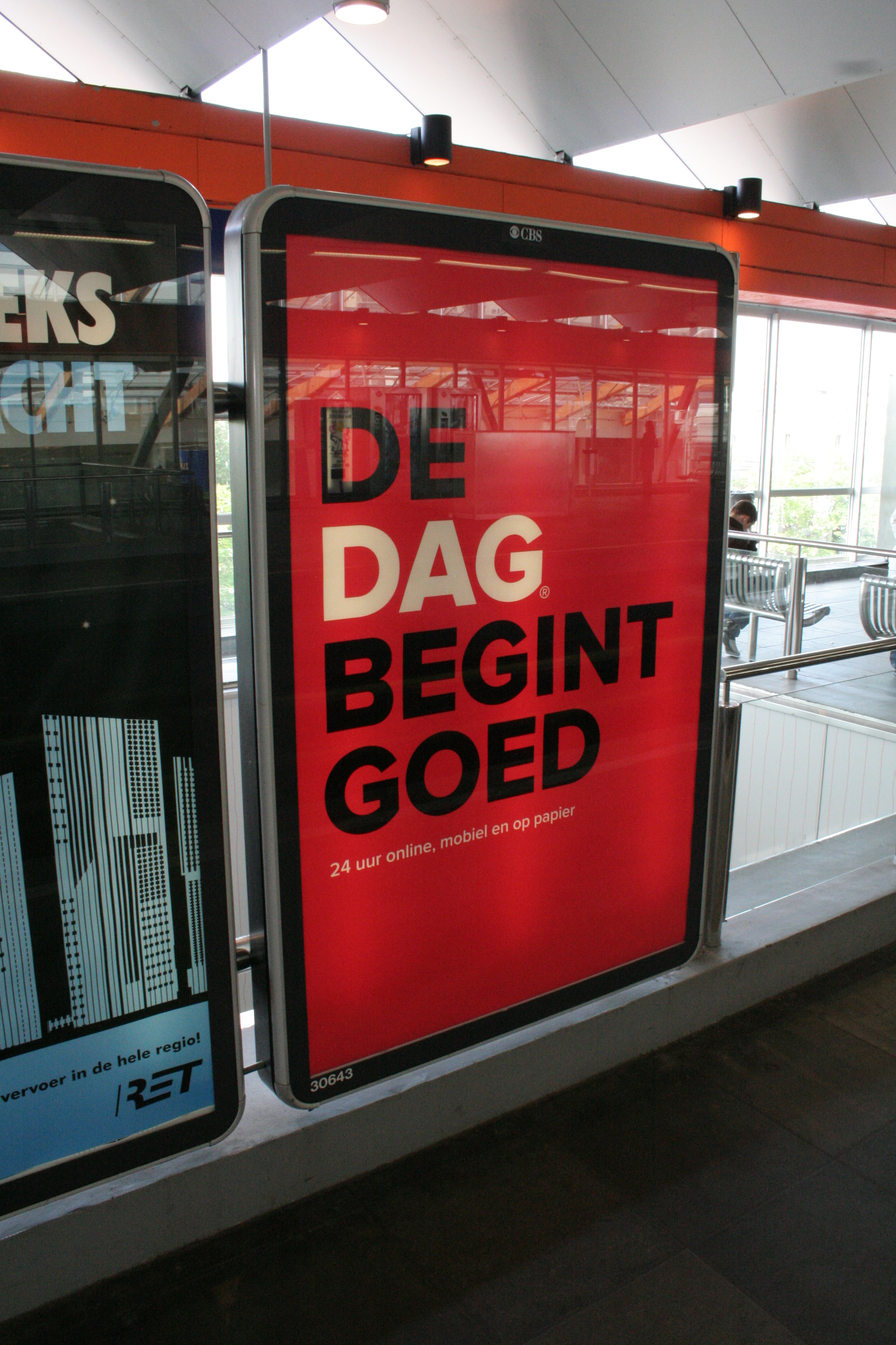 Reclame voor DAG, een gratis krant.